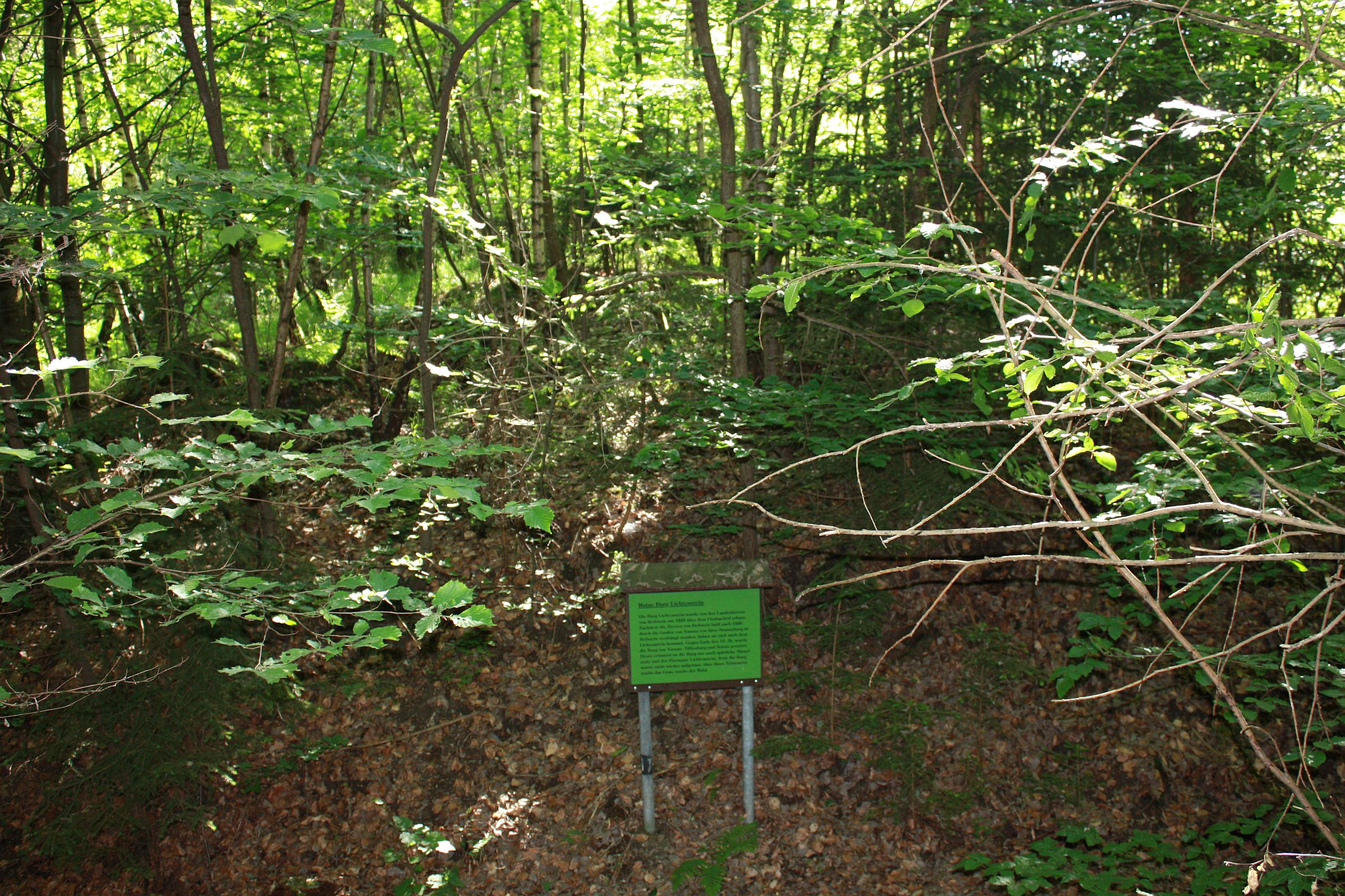 Reste der ehemaligen Burg Lichtenstein oberhalb der Ulmtalsperre zwischen Holzhausen und Greifenstein in Hessen, Deutschland